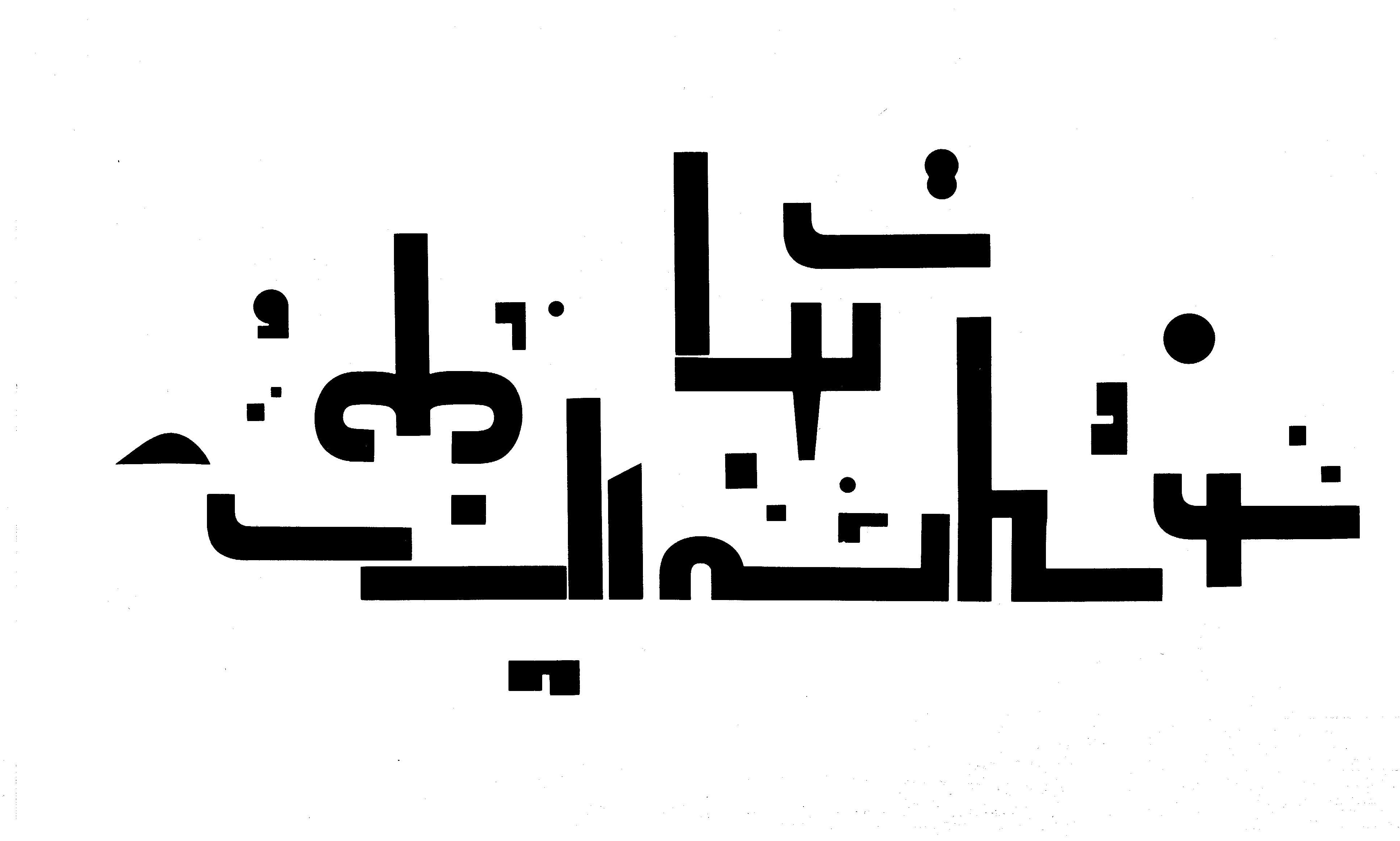 Tecnica: Letraset su cartone; cm 75 x 55